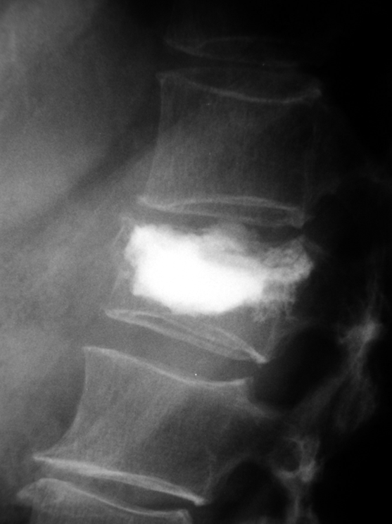 Seitliches Röntgen nach Aufrichtung und Kyphoplastie